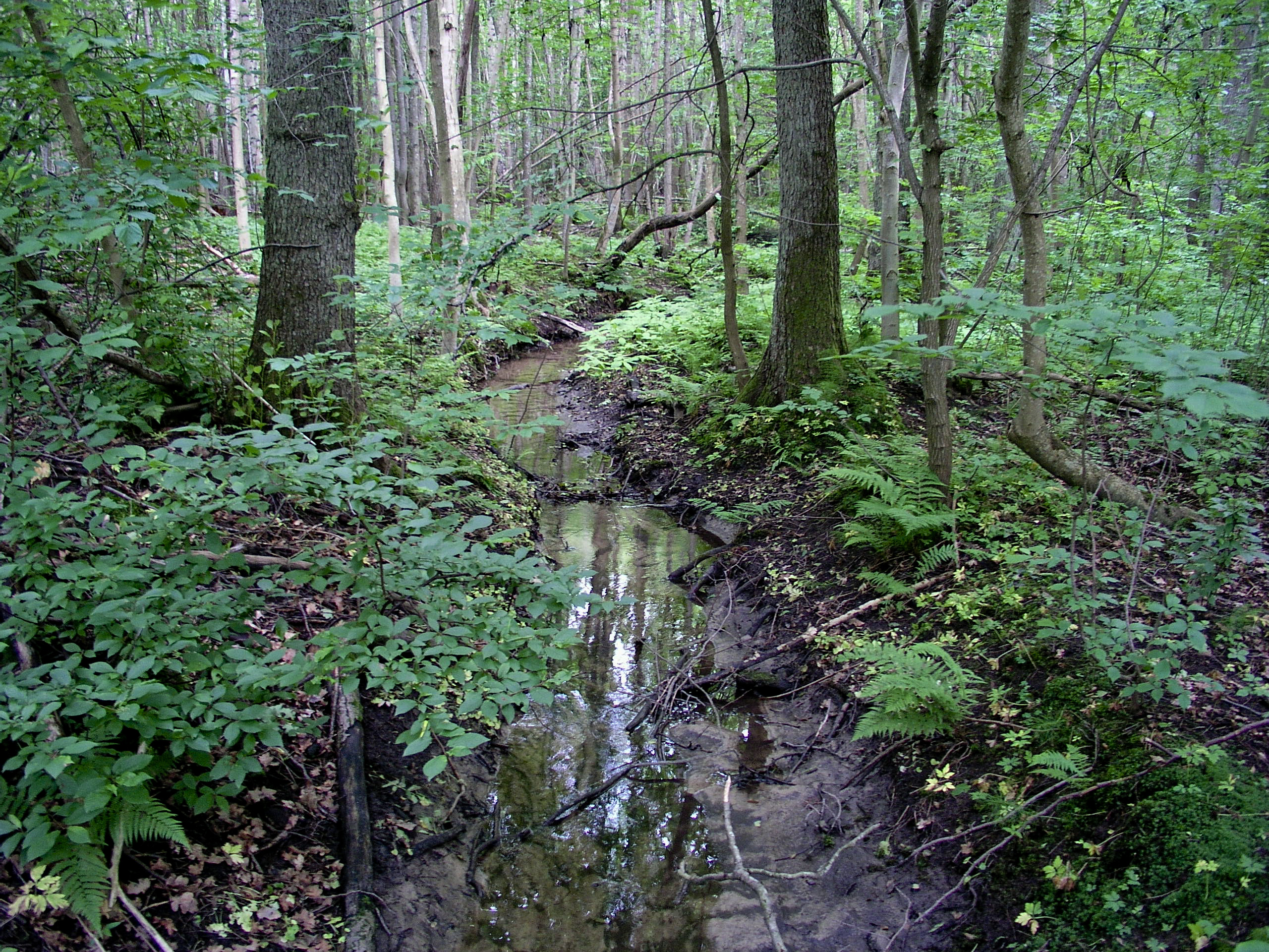 Kärna mosse naturreservat, avrinningen från en av kallkällorna. Malmslätt, Linköping, Sverige.